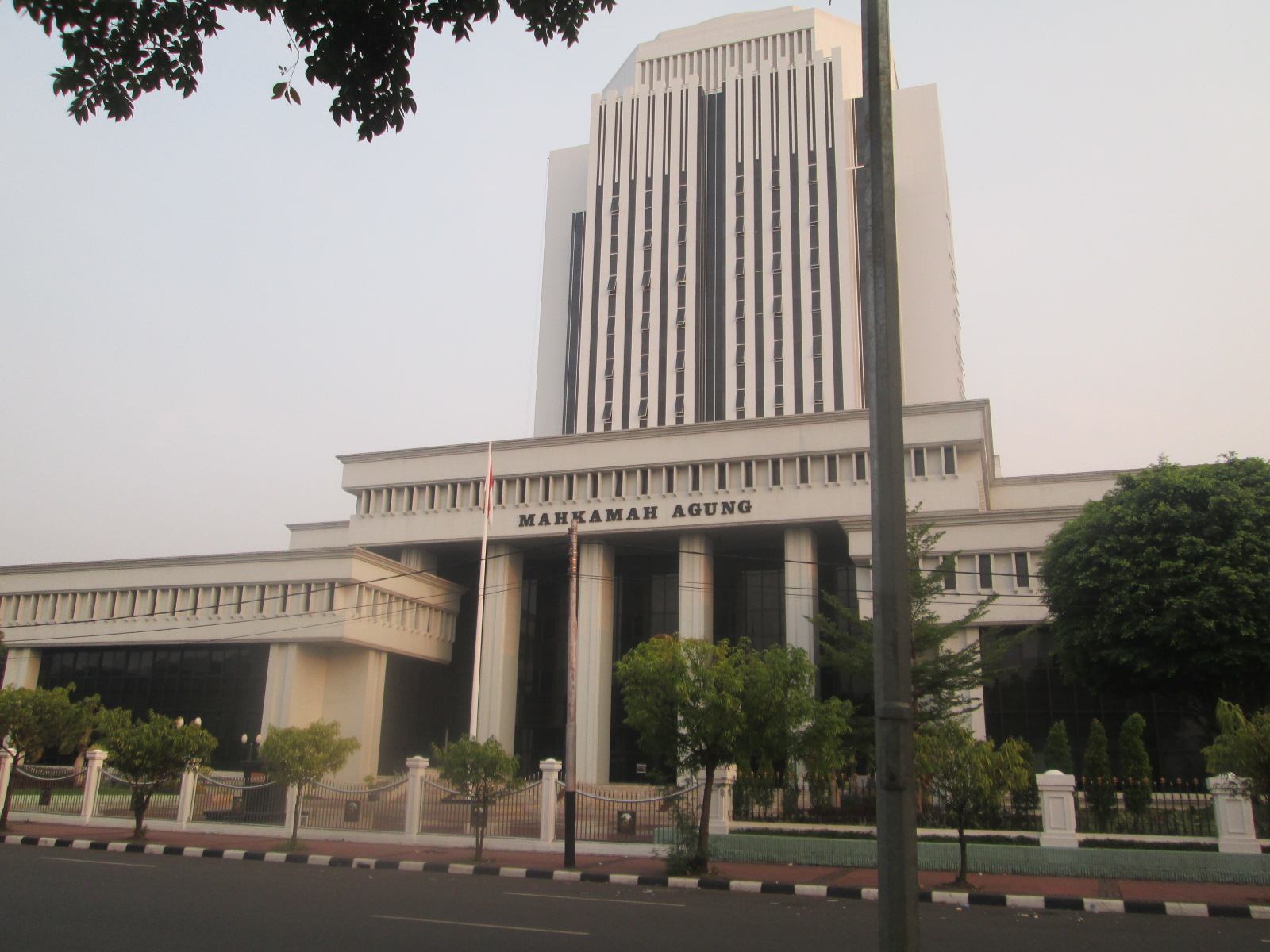 Gedung Mahkamah Agung Republik Indonesia Jl. Medan Merdeka Utara No, 9-13 Jakarta